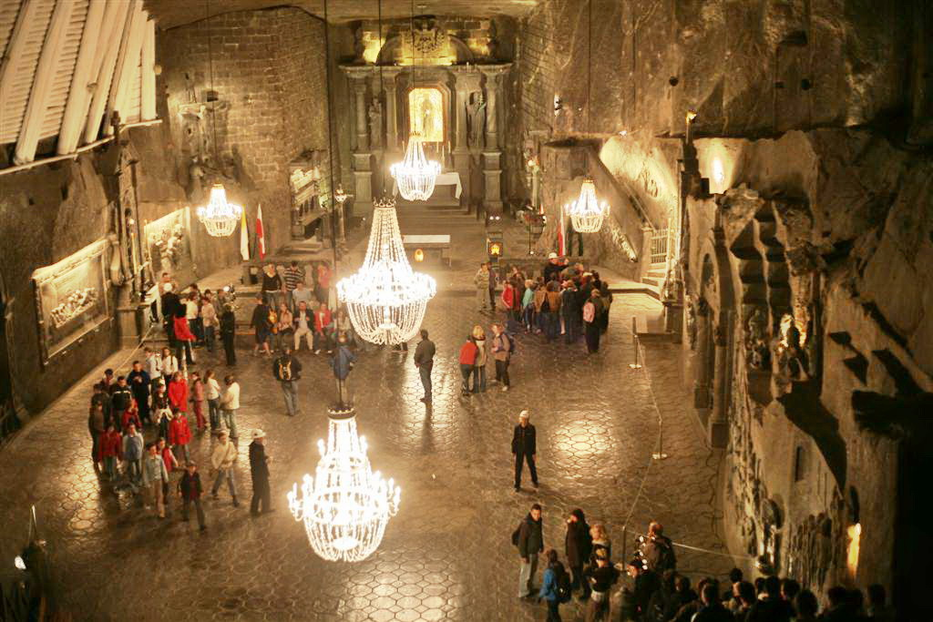 Kopalnia soli w Wieliczce - Kaplica Świętej Kingii